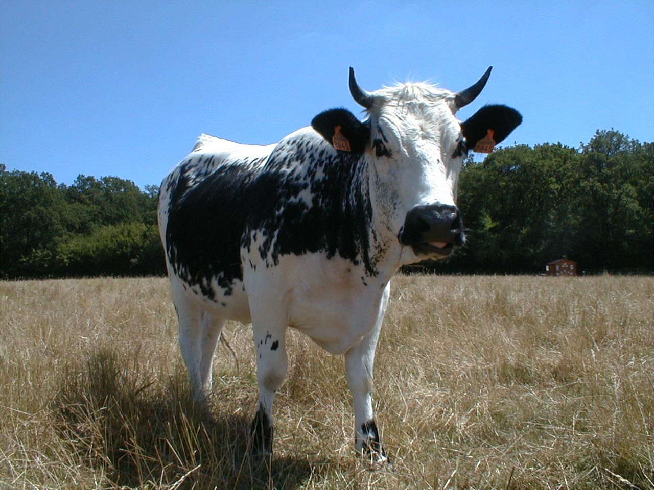 vache de race vosgienne. Photo prise à Divertiparc : Parc de loisirs nature. publication et diffusion autorisée par Divertiparc selon les termes de la licence GNU Free Documentation. --Cyrille BERNIZET 20 avr 2005 à 02:20 (CEST) Category:Vosges